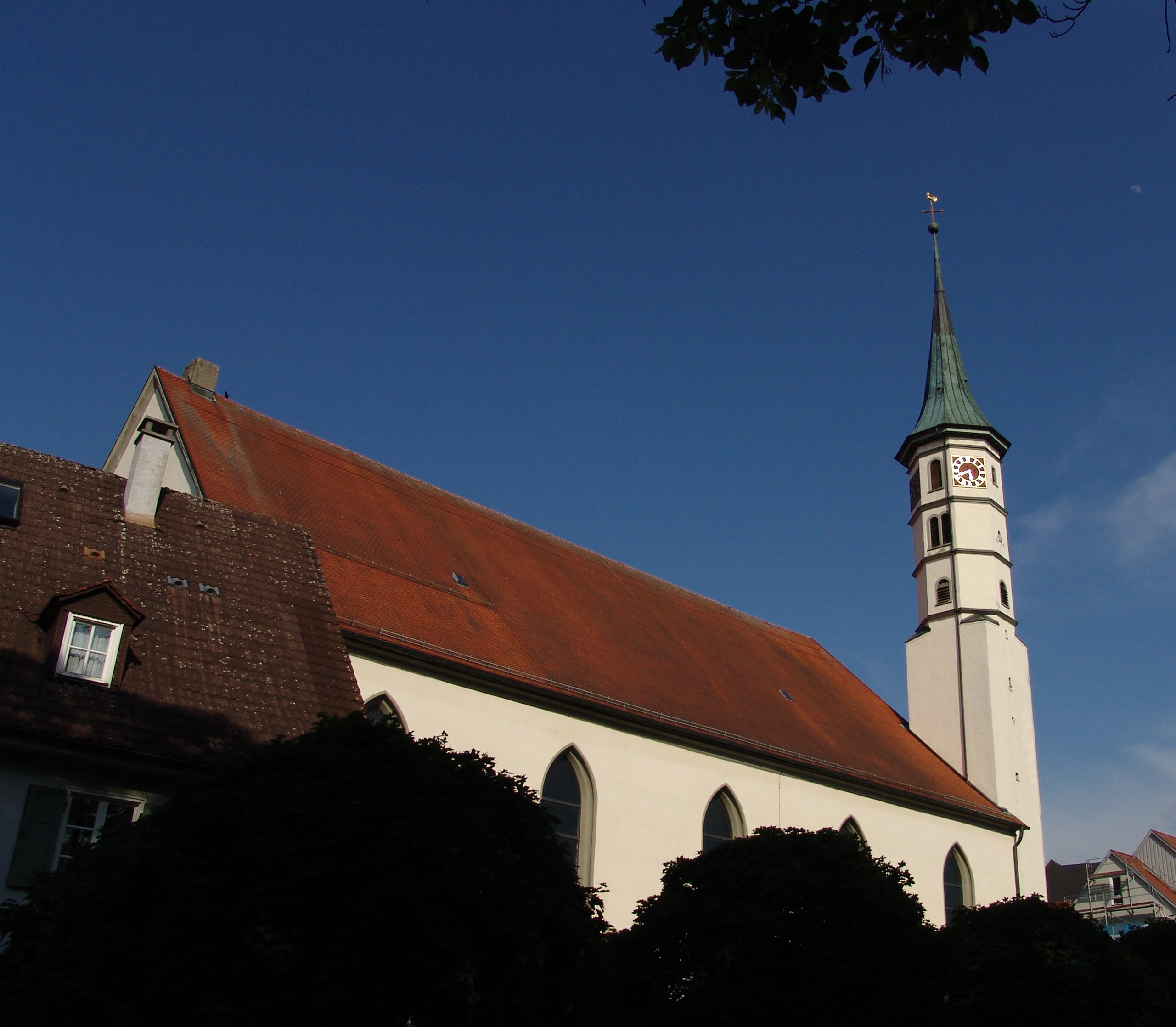 Leutkirch, Dreifaltigkeitskirche. Von 1613 bis 1615 baute die evangelische Gemeinde die Dreifaltigkeitskirche, die heutige evangelische Hauptkirche der Stadt als ersten protestantischen Kirchenbau zwischen Donau und Bodensee. Architekt war Daniel Schopf, der eine Kirche im Stil von Heinrich Schickhardt schuf. Diese wurde 1857/60 neugotisch umgestaltet, doch wurde dies 1972 bis auf die Ausstattung wieder rückgängig gemacht.